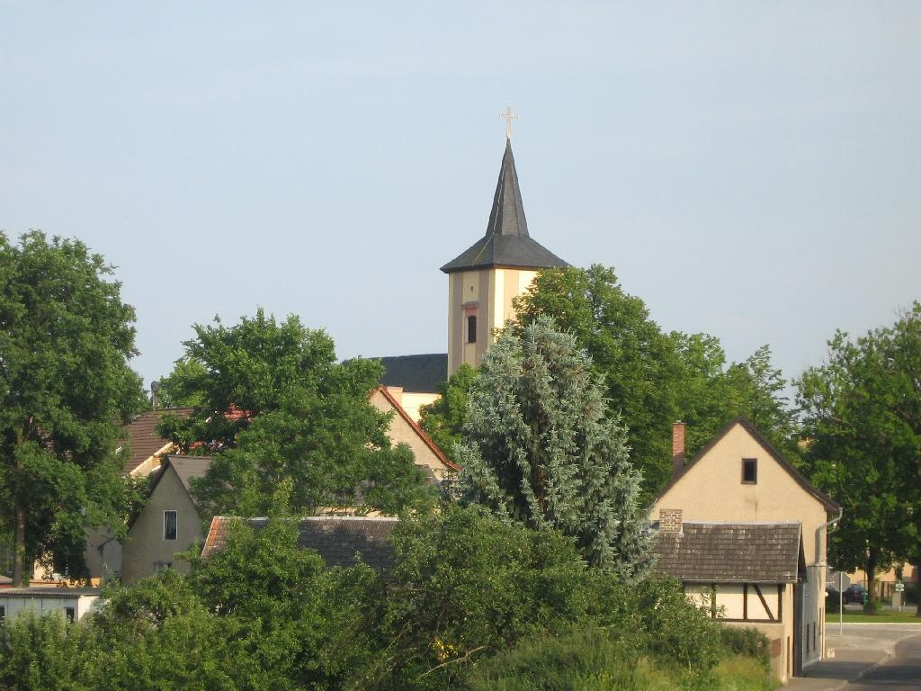 Märkisch Buchholz im Landkreis Dahme-Spreewald, Brandenburg (Germany)